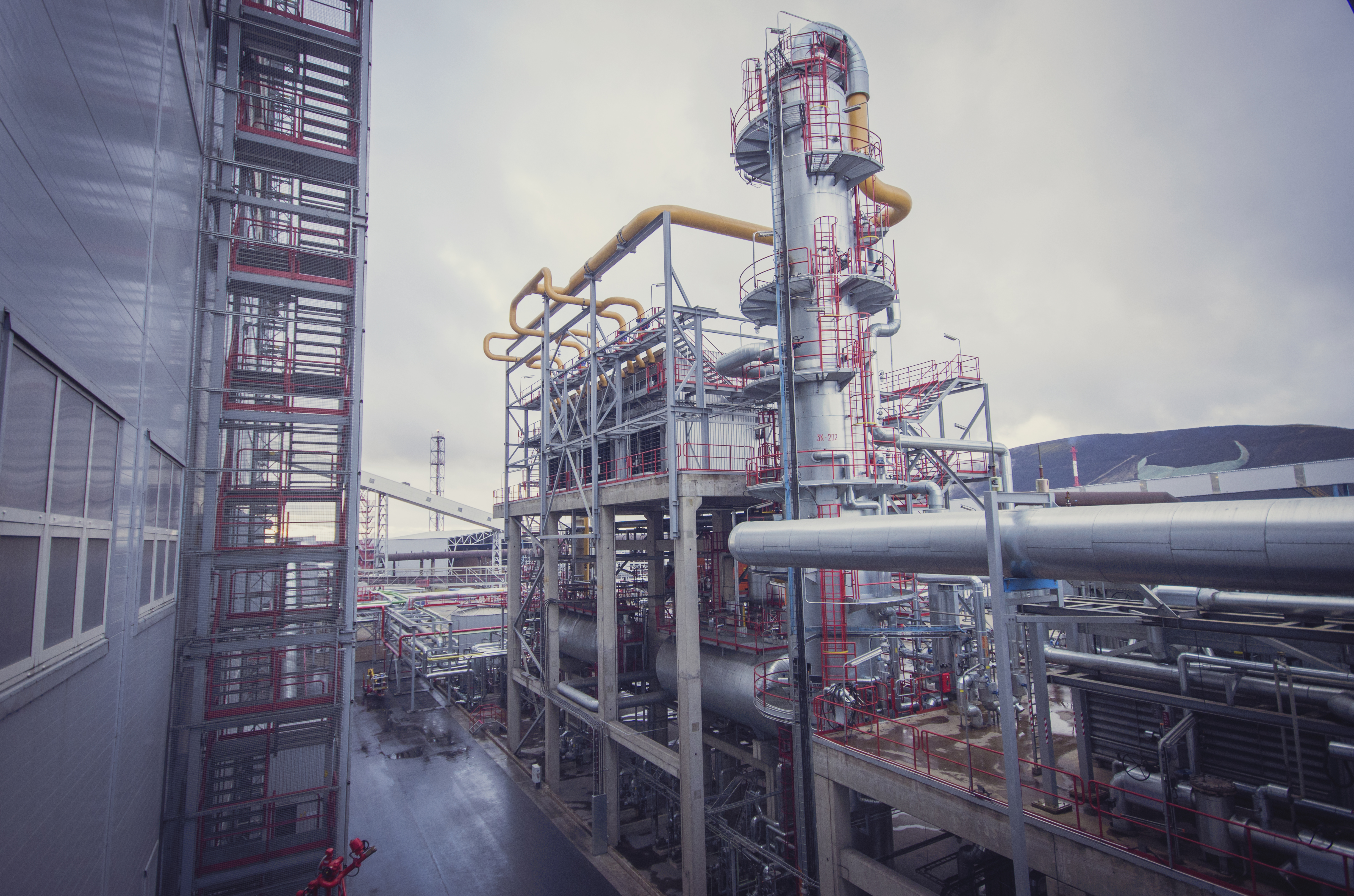 VKG Petroter seadmed.